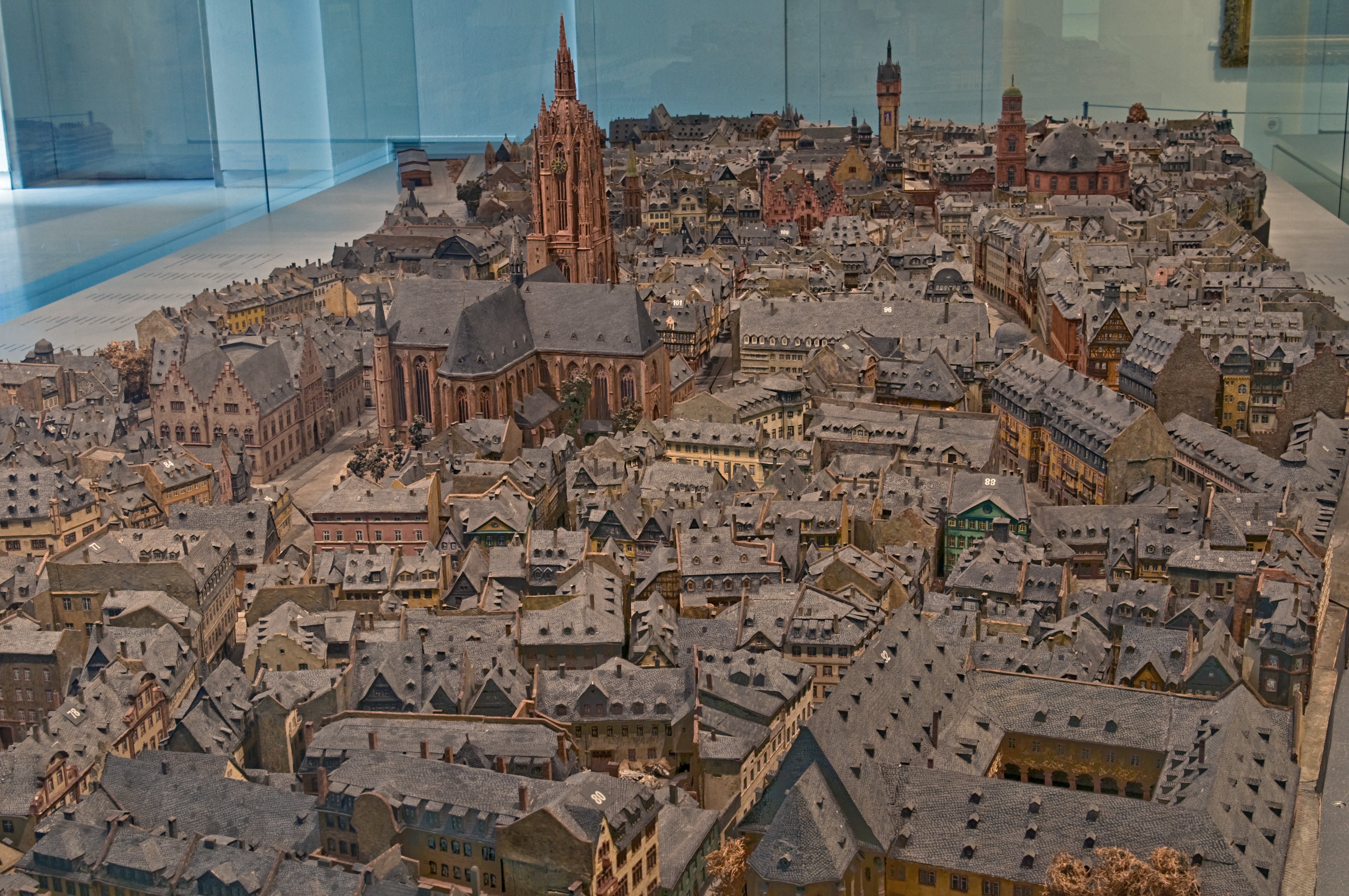 Historisches Museum Frankfurt am Main Altstadtmodell der Brüder Treuner Gesamtsicht von Osten